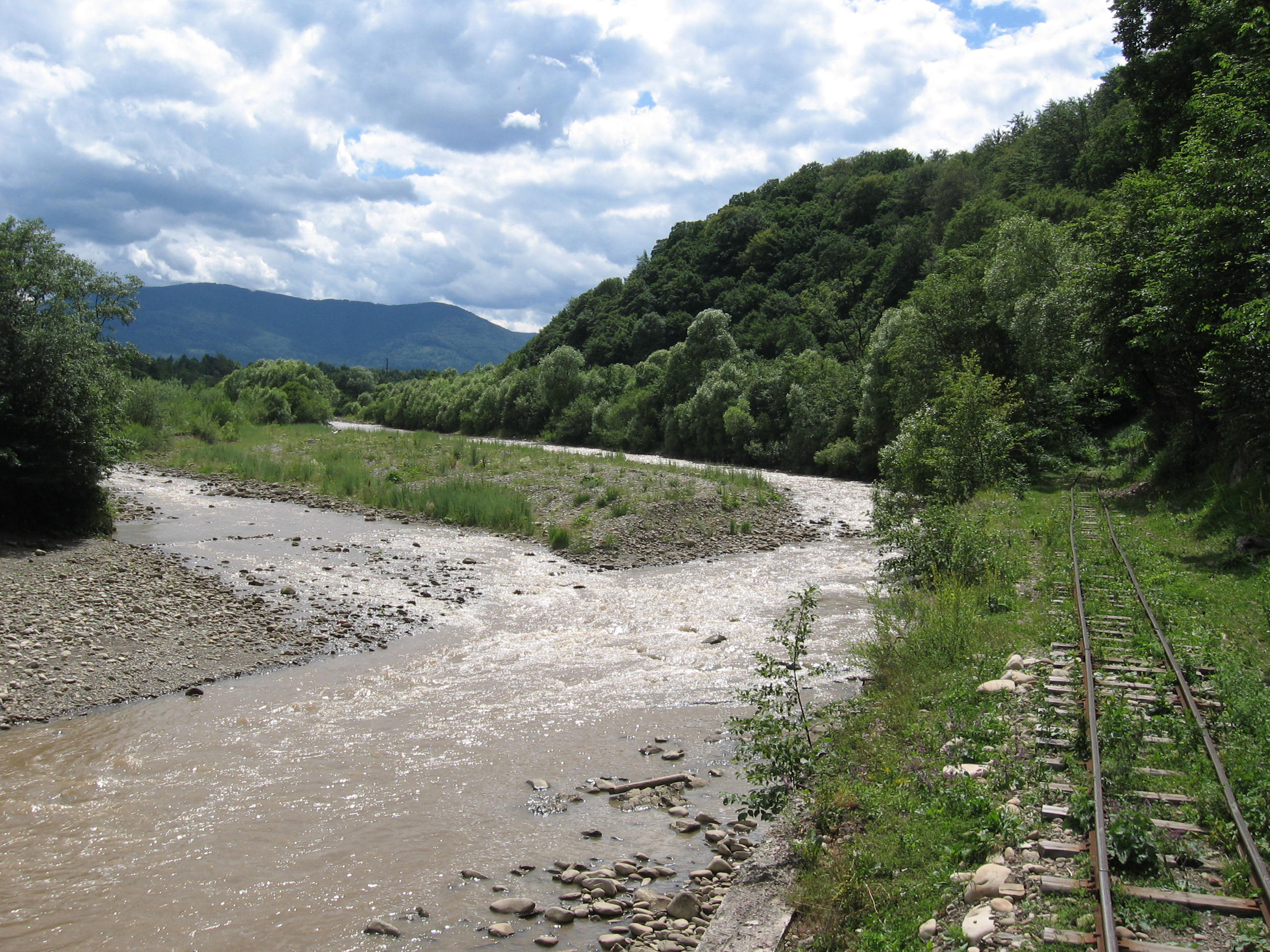 Річка Свіча і вузькоколійка біля смт Вигода, Долинський район, Івано-Франківська область.